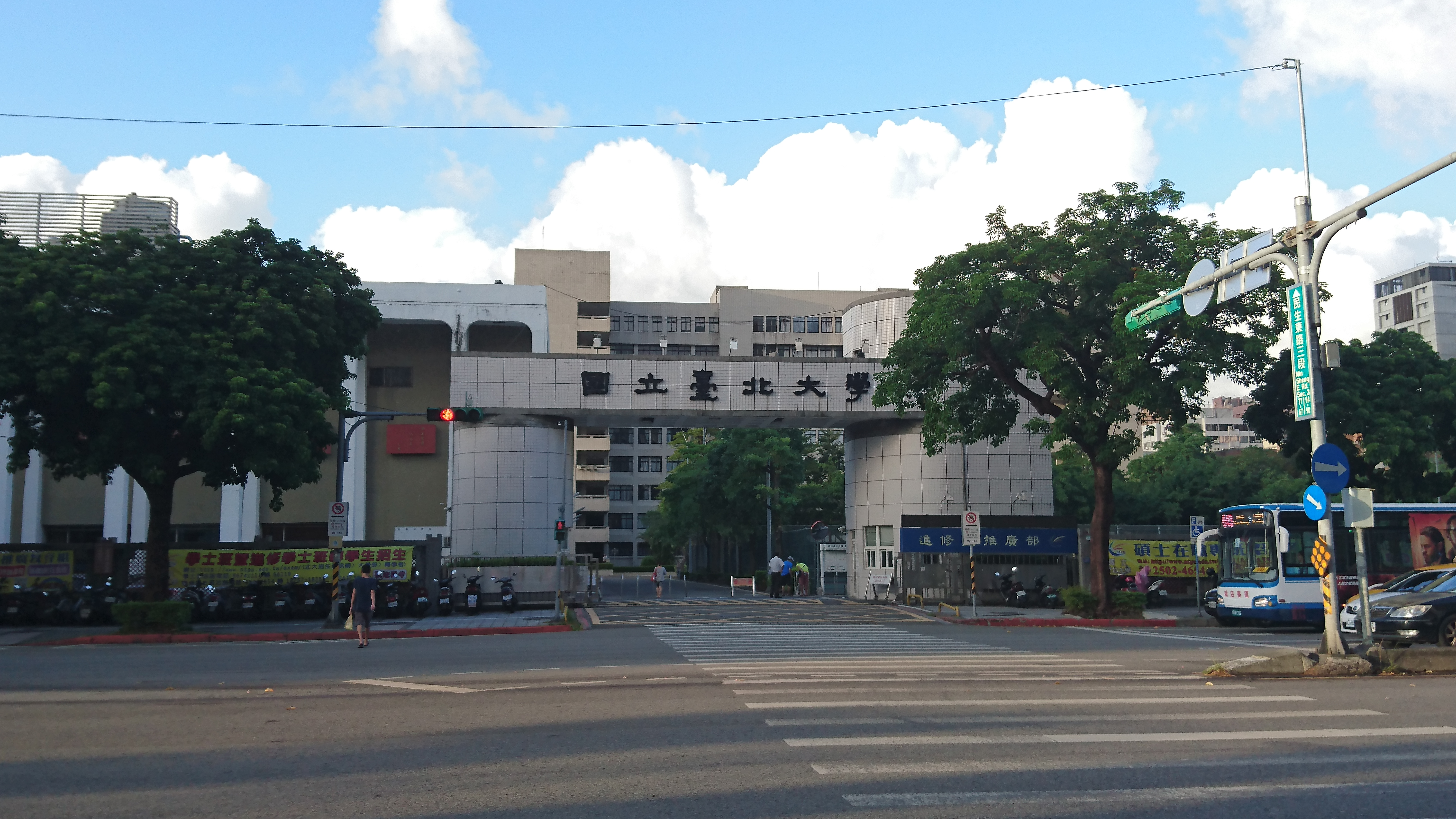 中文（台灣）: 民生校區正門1